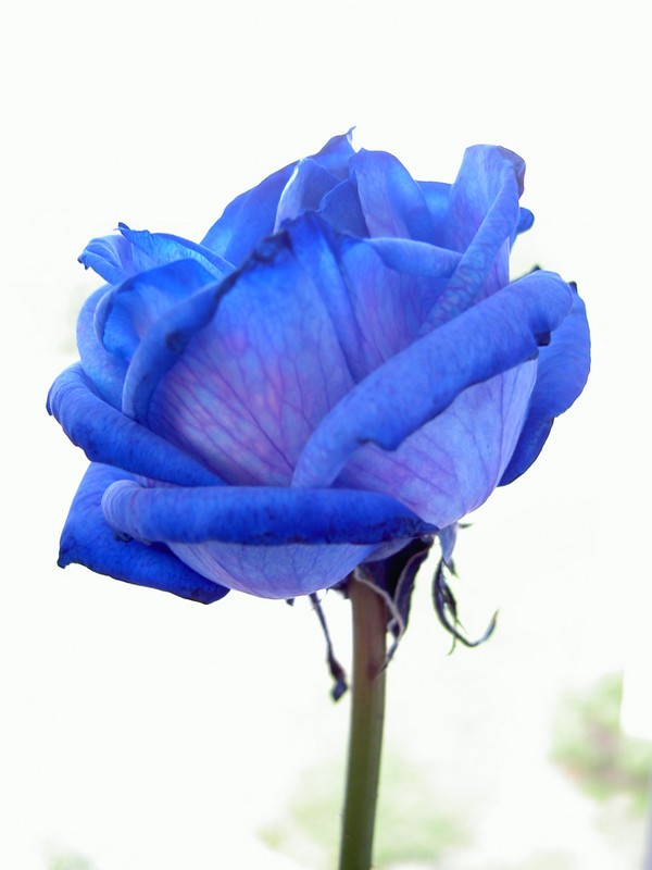 Rose bleue créée artificiellement